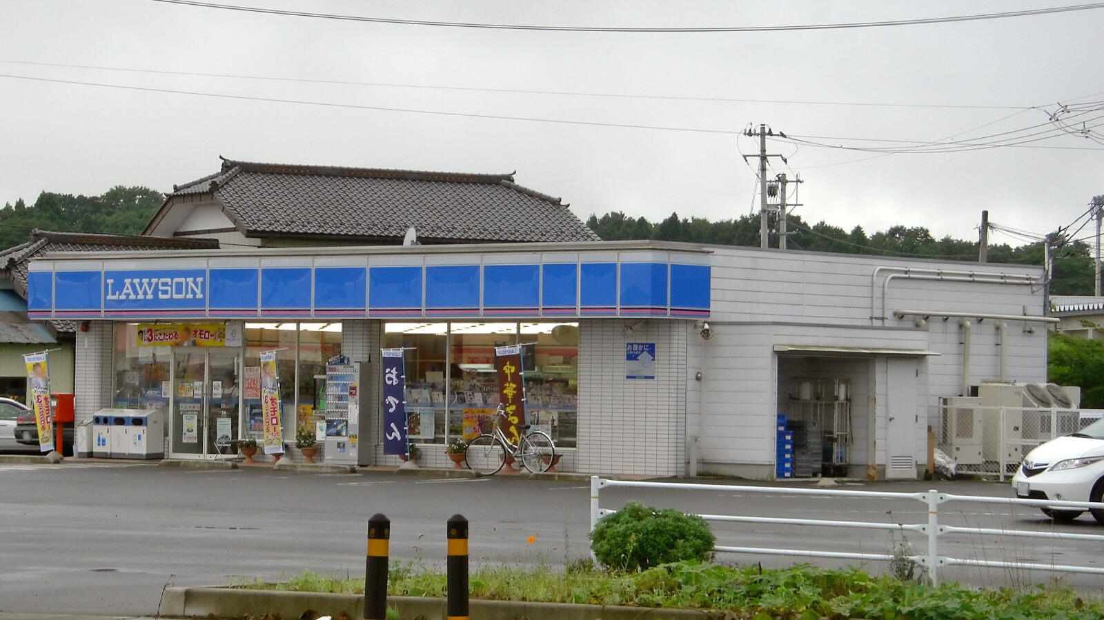 ローソン原町北原店